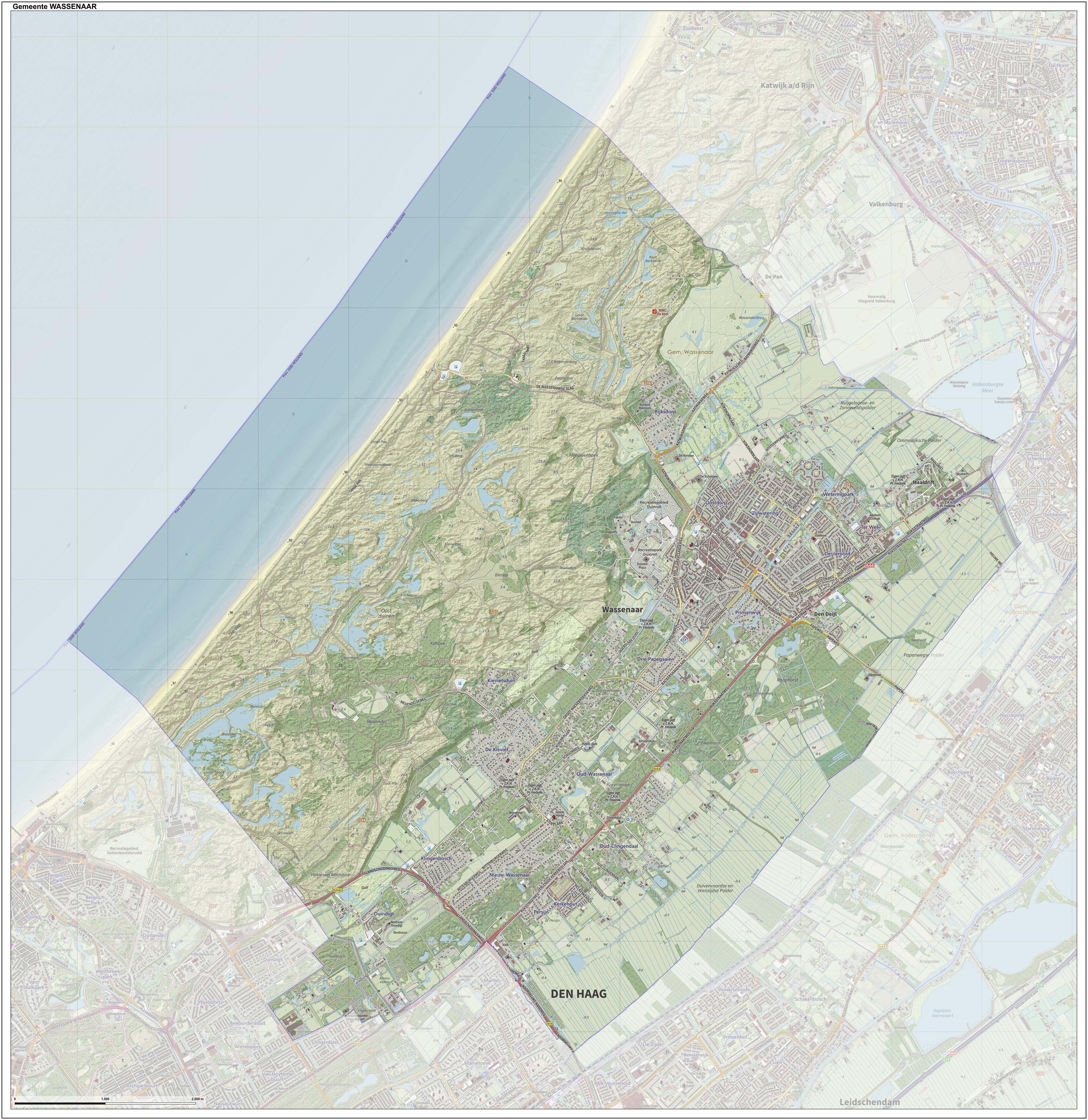 Topografische gemeentekaart. Resolutie: 400 pixels/km. Samengesteld door Jan-Willem van Aalst op basis van de GML open geodata van de BRT/Top10NL (basisregistratie Topografie, Kadaster), vrijgegeven door Kadaster onder de Creative Commons BY licentie. Additionele gegevens uit BAG uit de Open Street Map en uit de Risicokaart. Zie ook de Legenda.